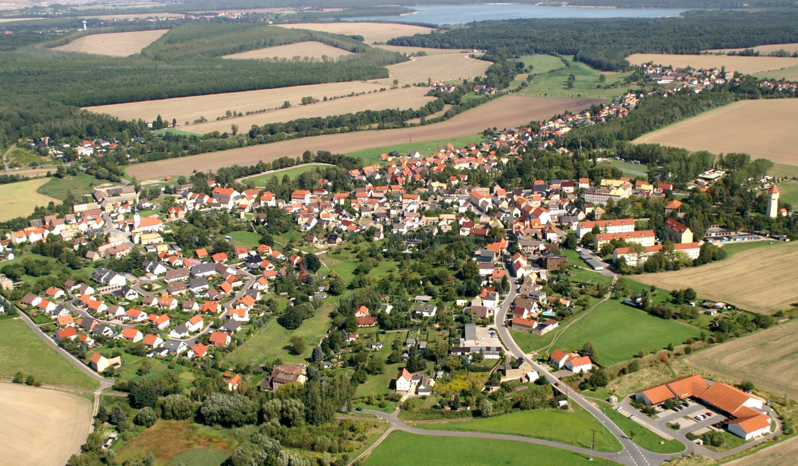 Luftbild: Wintersdorf/ Thüringen